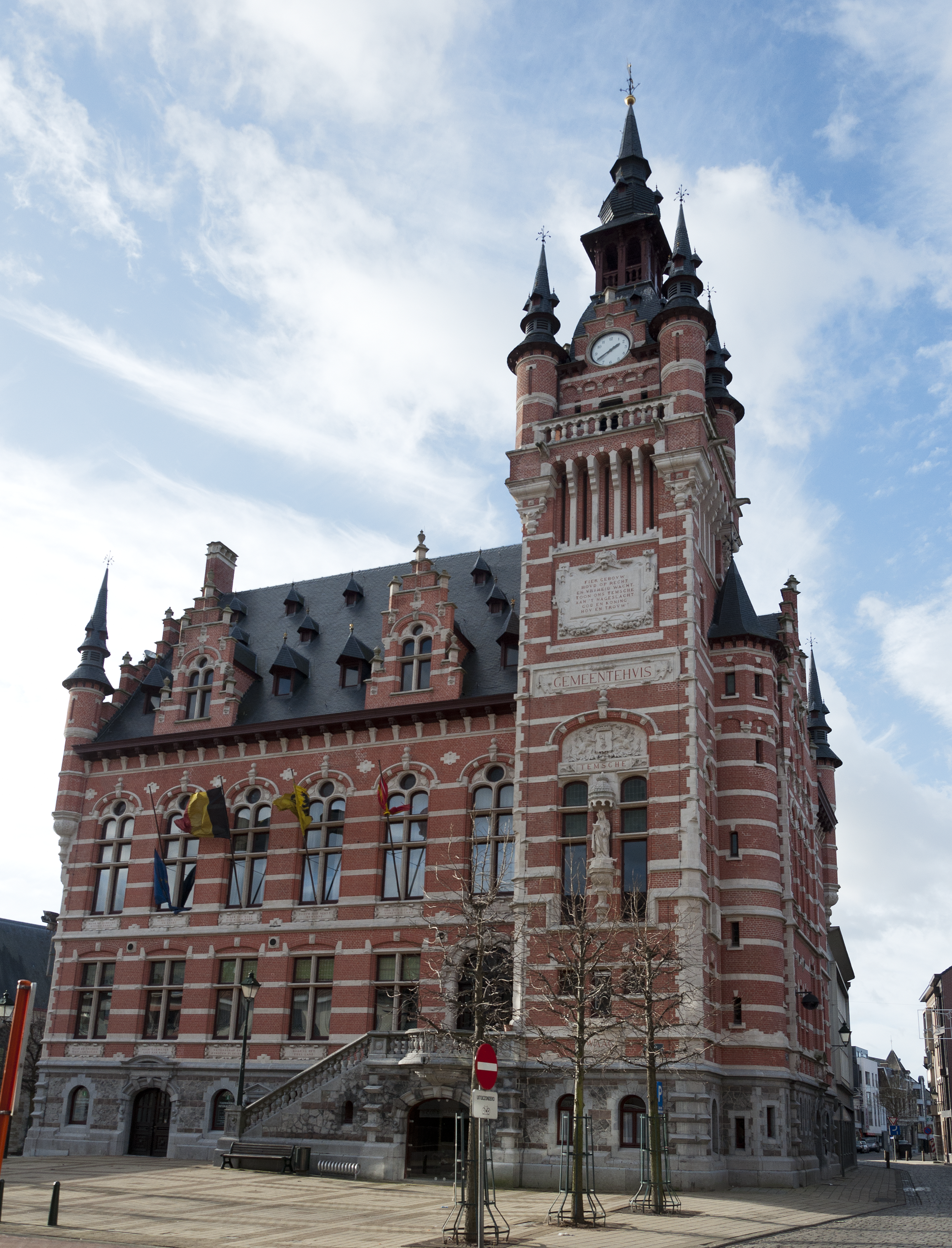 Het gemeentehuis van Temse (1905), België in eclecticistische stijl